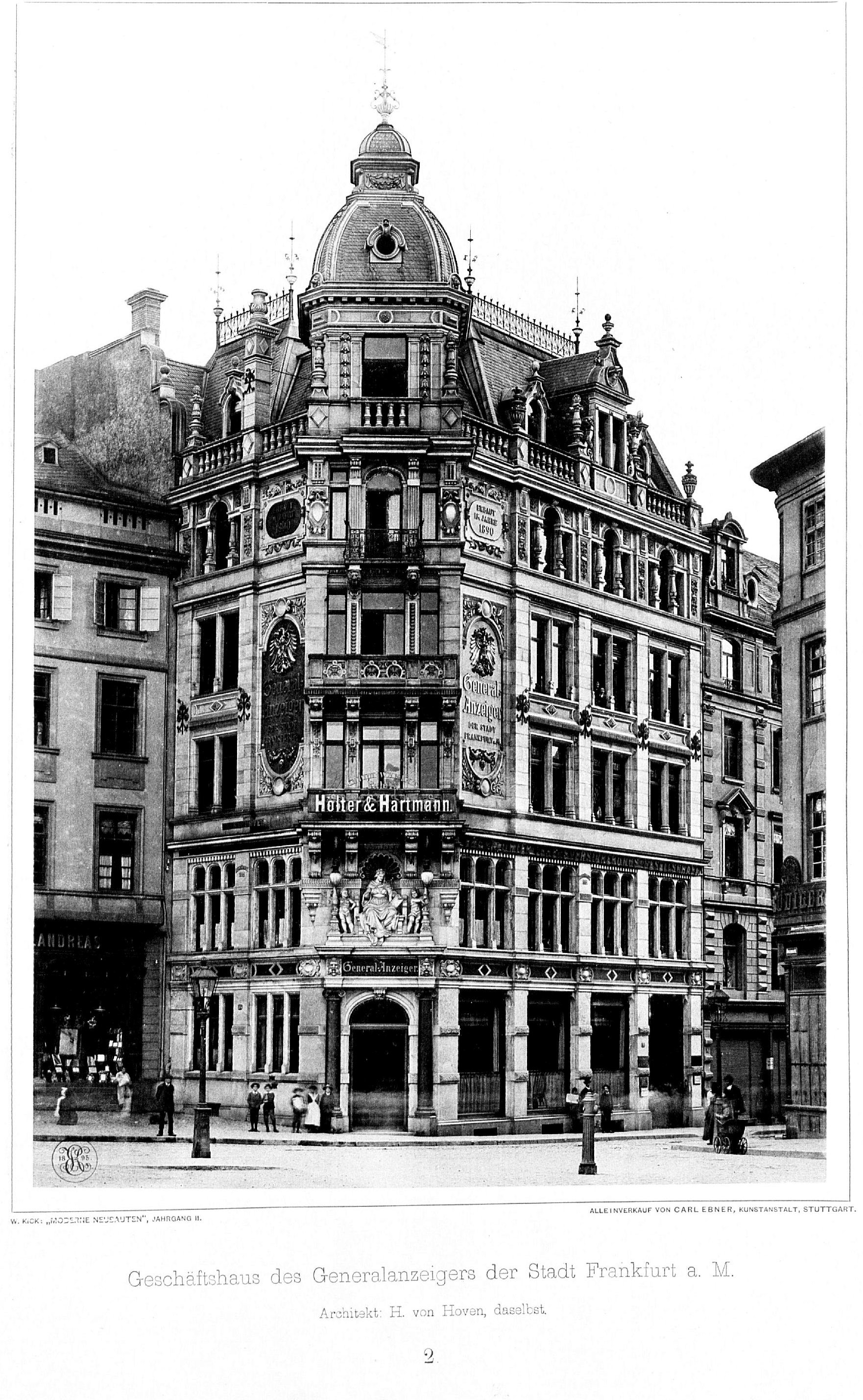 Büro- und Geschäftshaus des Verlags des Generalanzeigers der Stadt Frankfurt am Main in Frankfurt am Main, Roßmarkt 20; erbaut 1890 nach Entwurf des Frankfurter Architekten Franz von Hoven